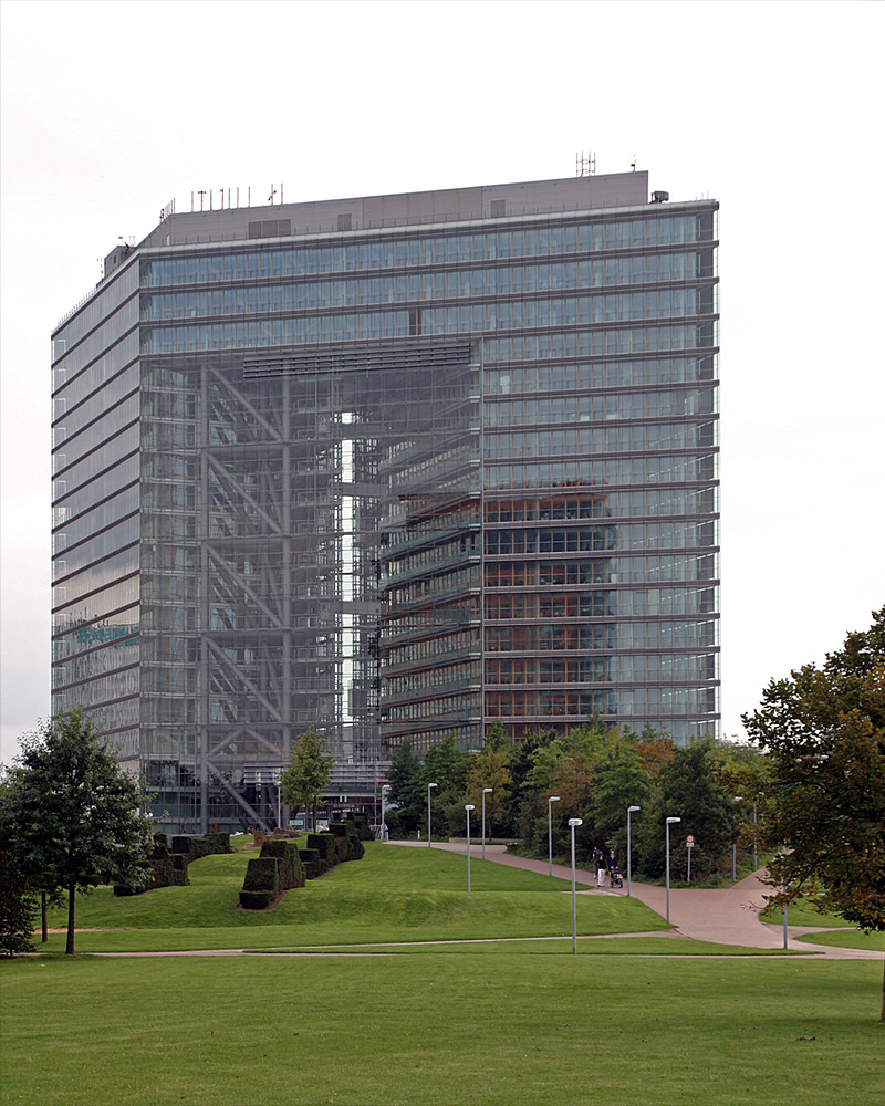 Das Düsseldorfer Stadttor